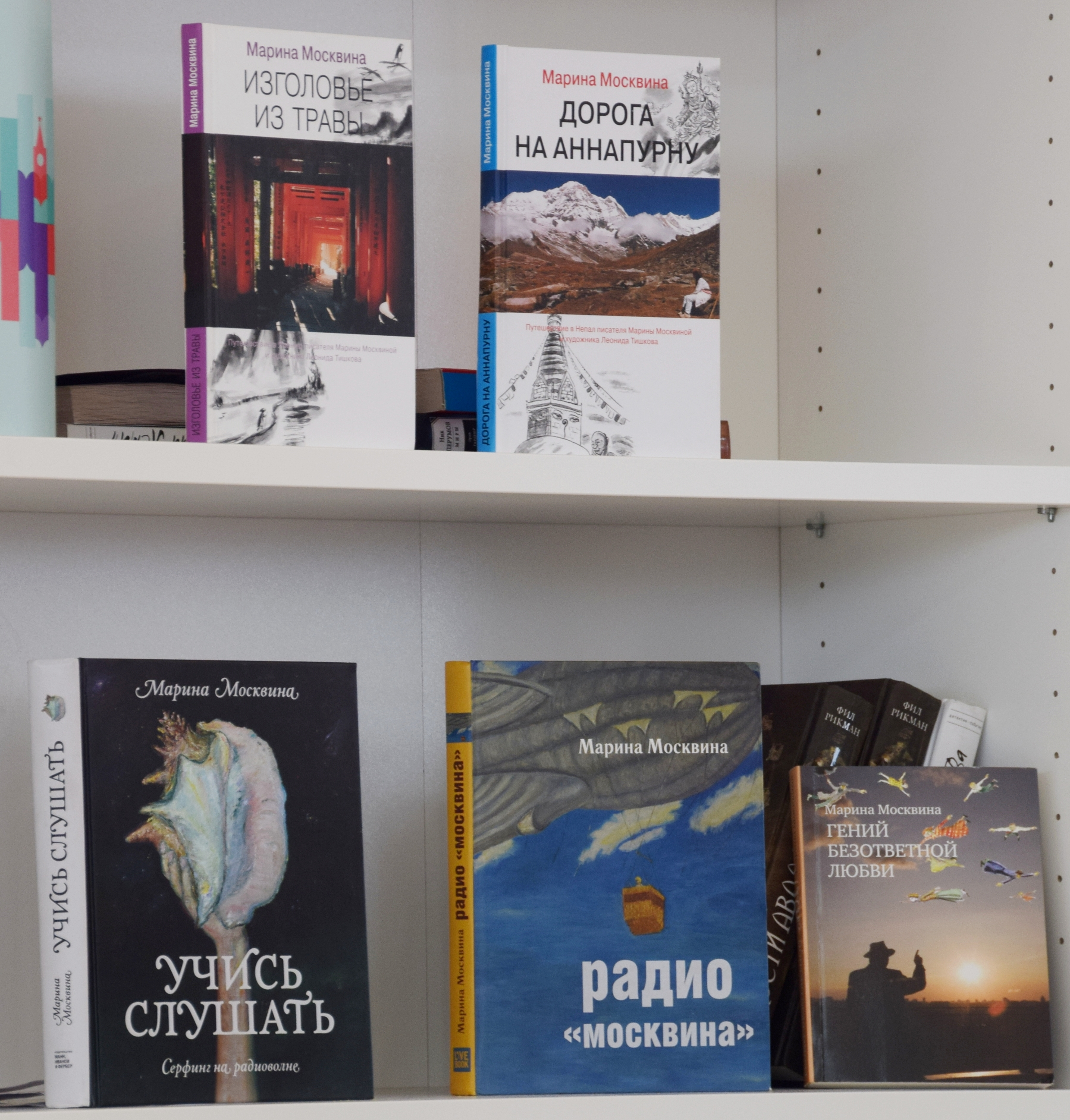 Фото: Александр Шинкаренко